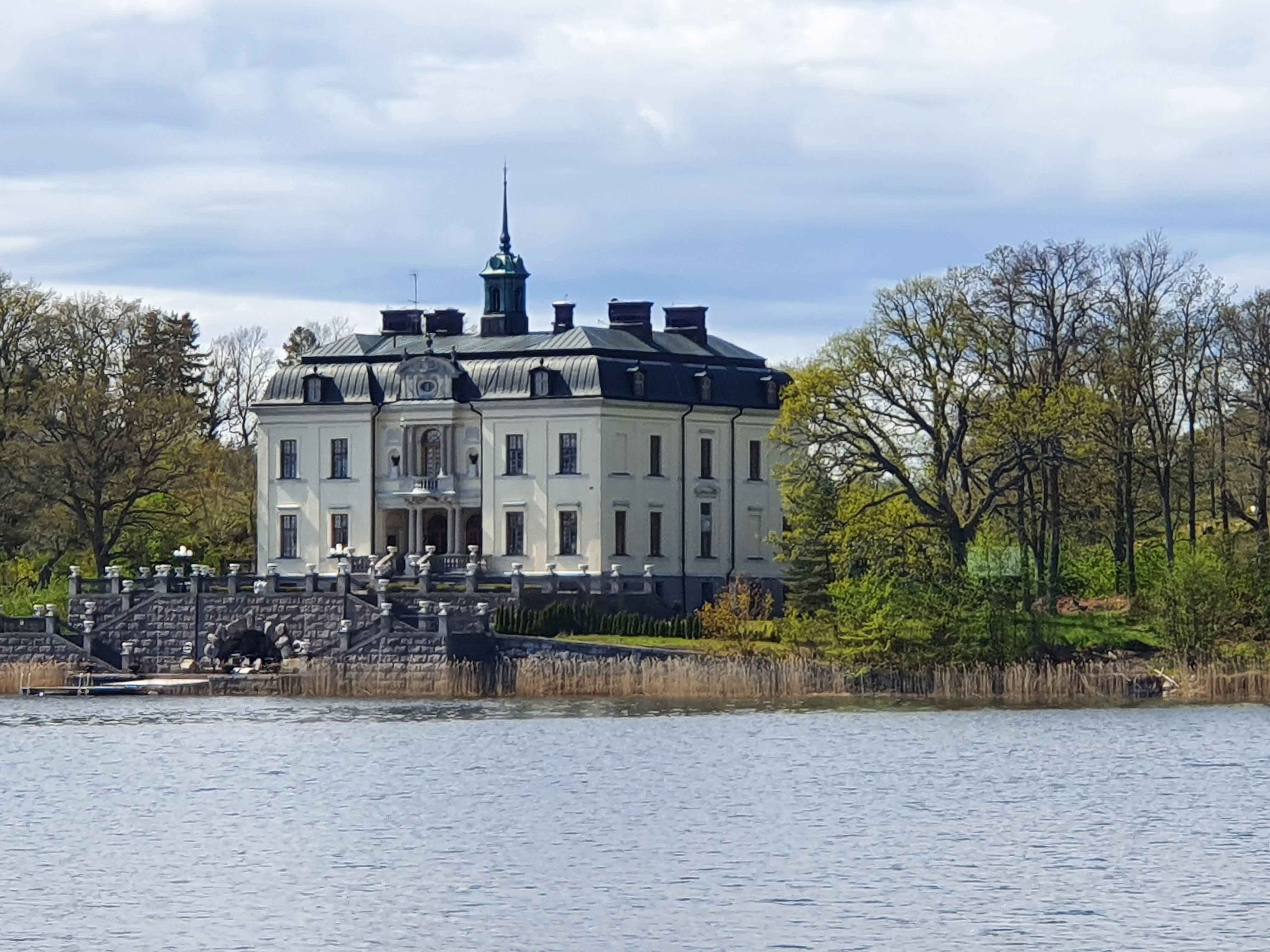 Gripsnäs, tidigare Villa Martin, Mariefred